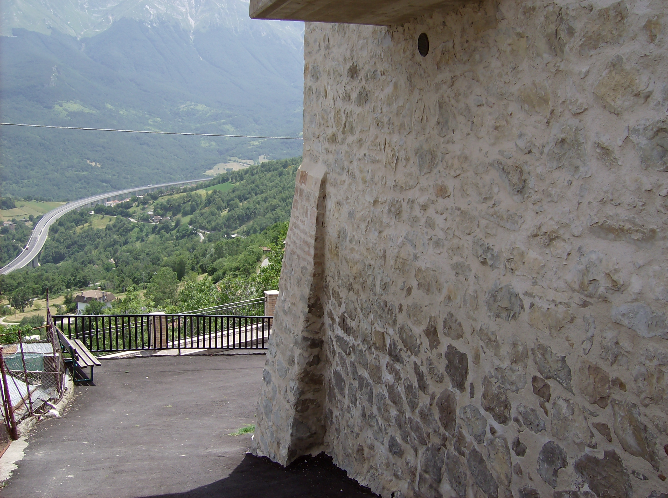 casa in Forca di Valle